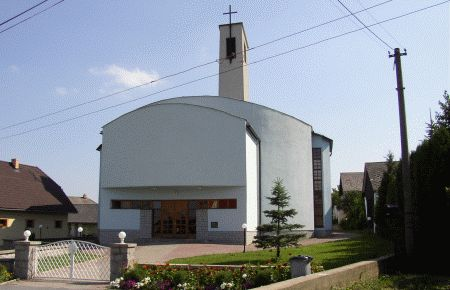 Church Ruzencovej p.Marie-Frickovce Village(Slovakia)